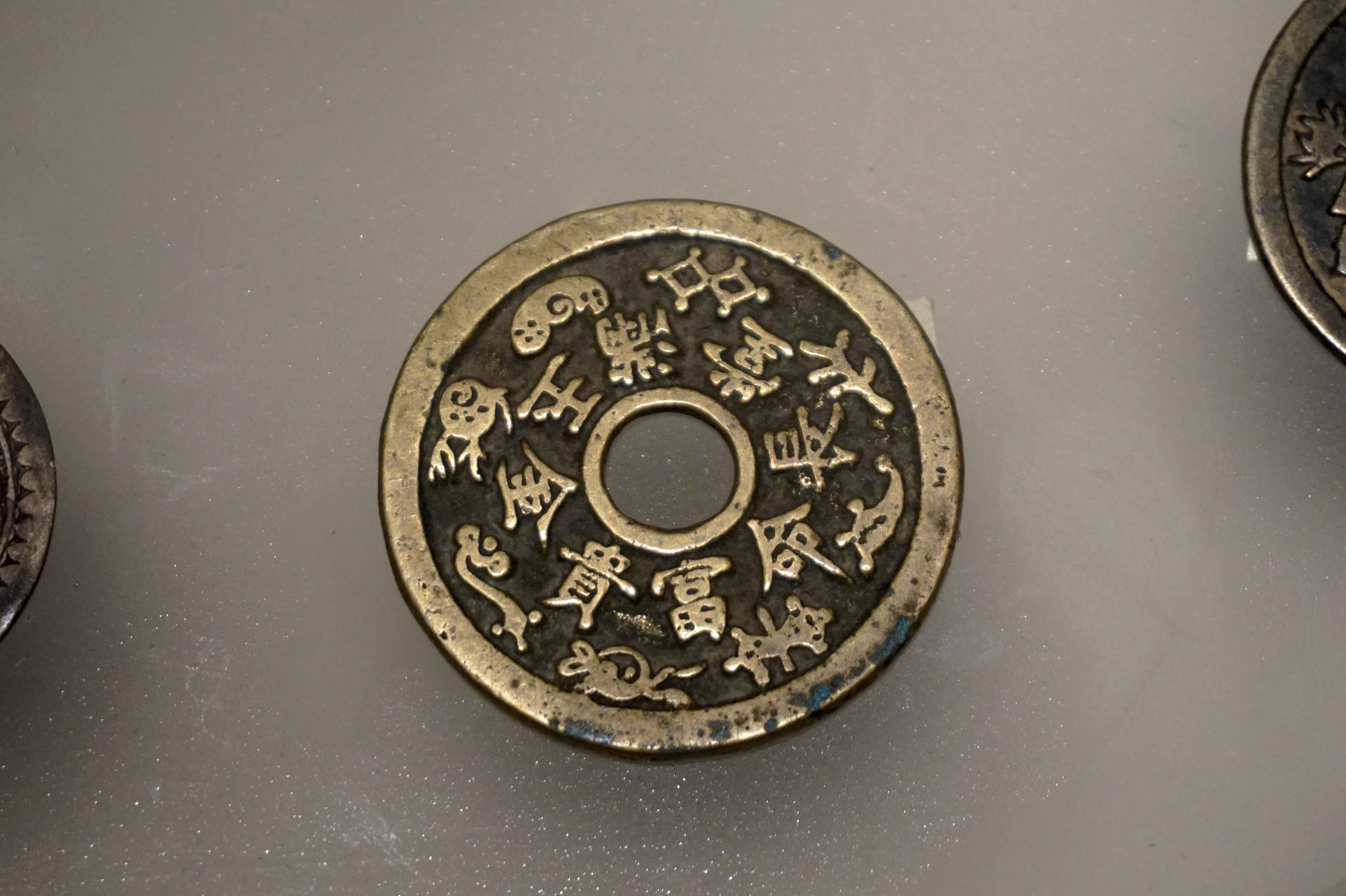 清厌胜钱。中国财税博物馆藏。